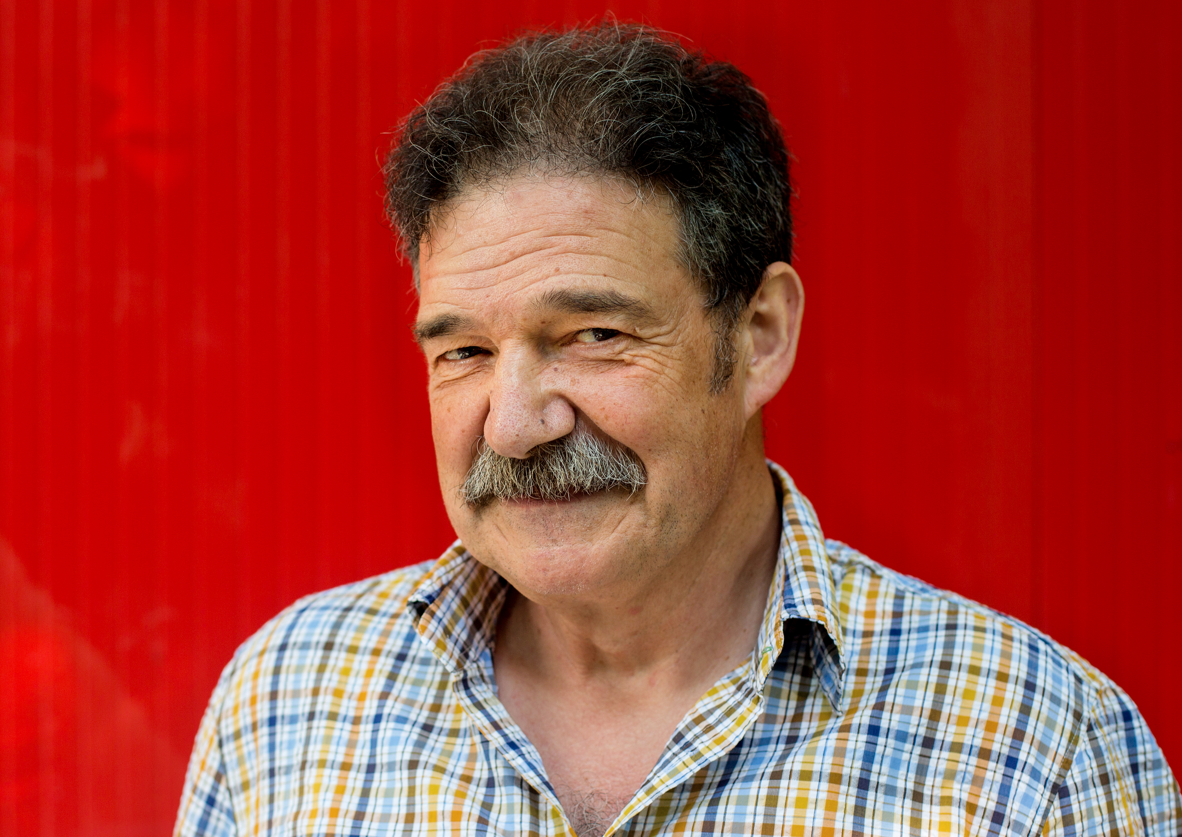 Xabier Olarra itzultzaile tolosarra